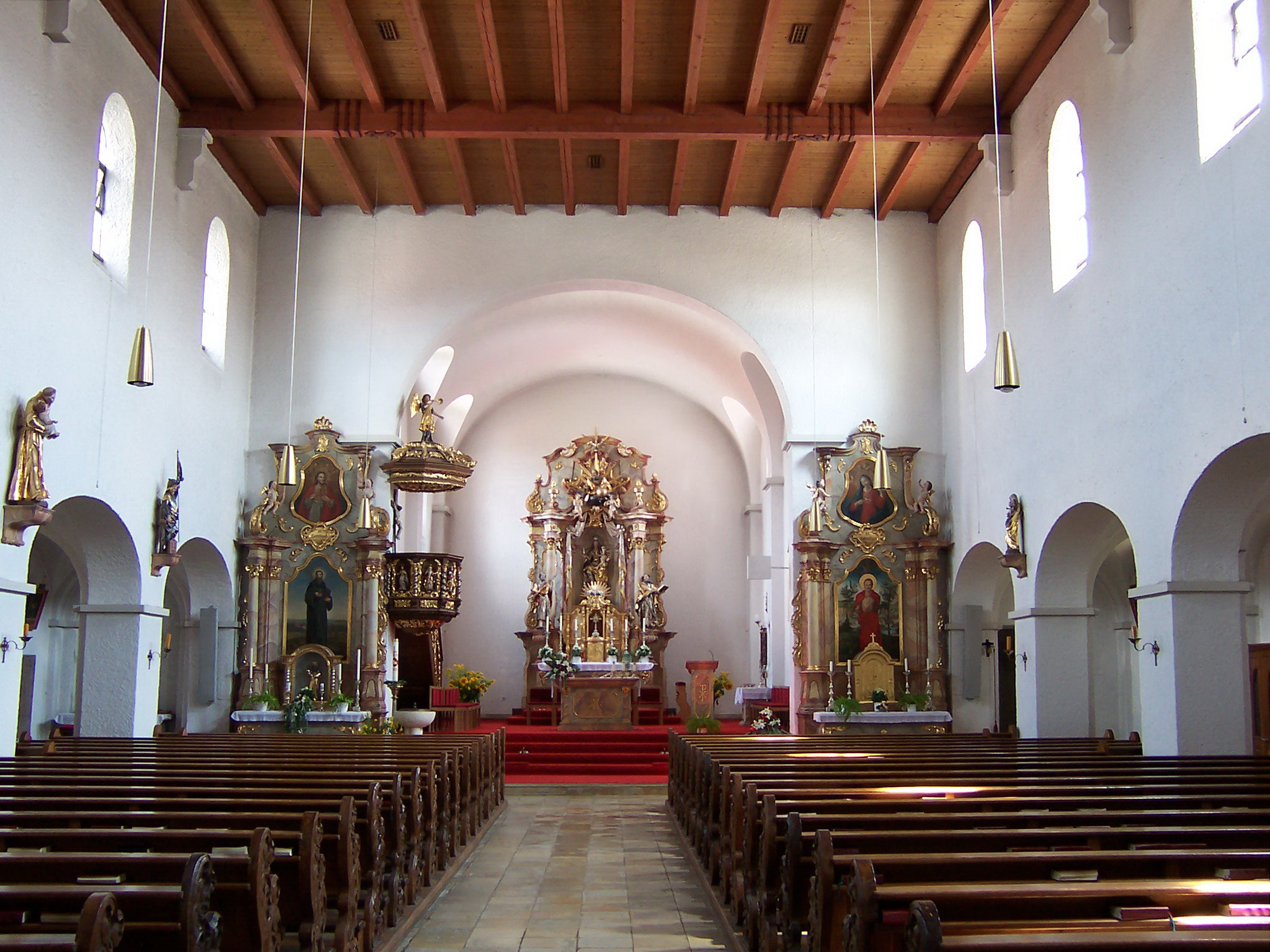 Neufahrn in Niederbayern, Hauptstraße 22. Pfarrkirche Mariä Himmelfahrt. Neubau in basilikaler Form 1937/38, vom Vorgängerbau (Chor romanisch, Langhaus 1620) den im Kern romanischen fünfgeschossigen Turm übernommen, schlichtes, weitgehend ungegliedertes Äußeres, Turm mit Lisenen und Putzbänderung, Treppengiebel und Satteldach wohl 16. Jahrhundert; mit Ausstattung, (Ausstattung der älteren Kirche übernommen).